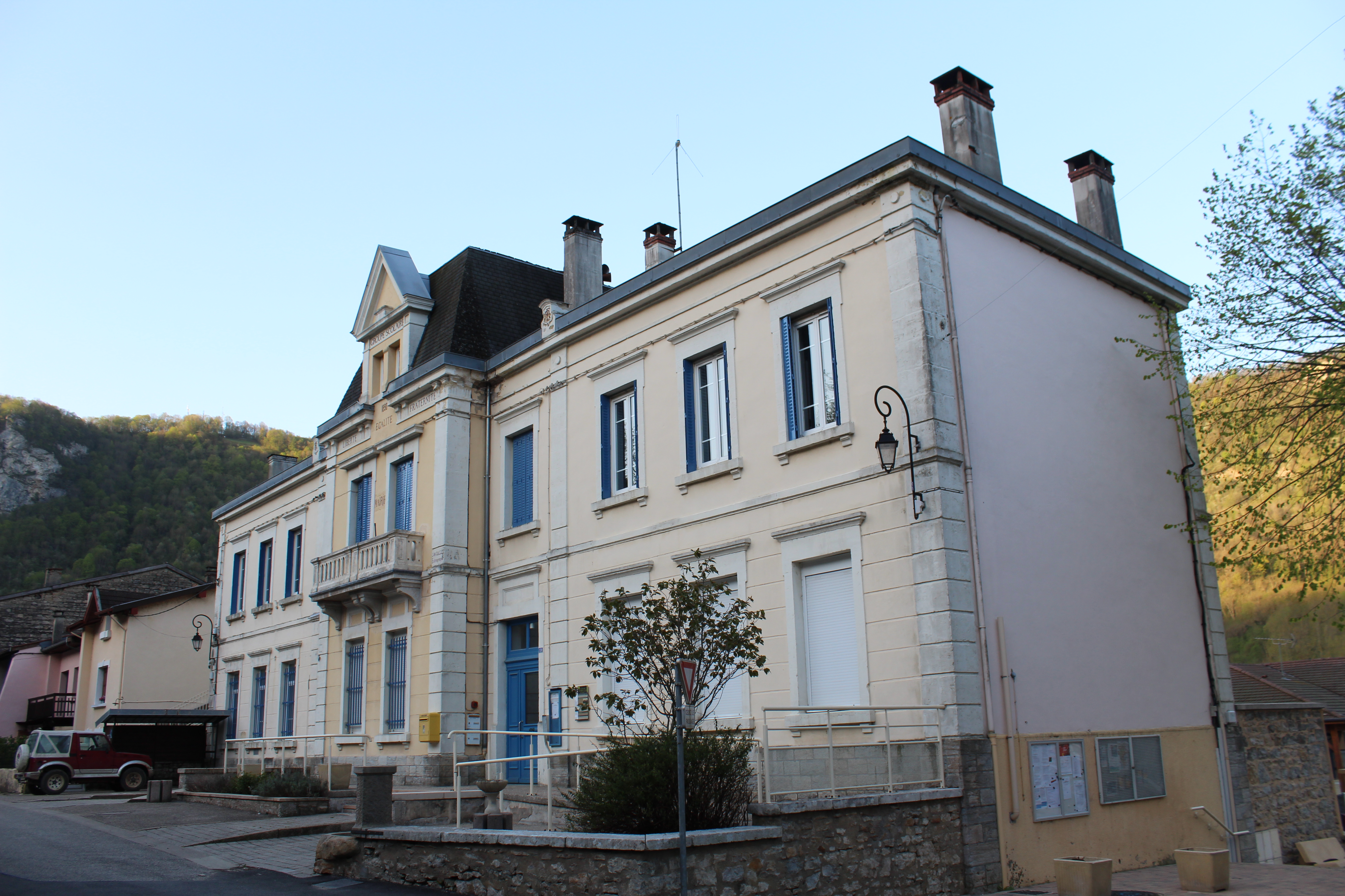 Mairie de Torcieu.